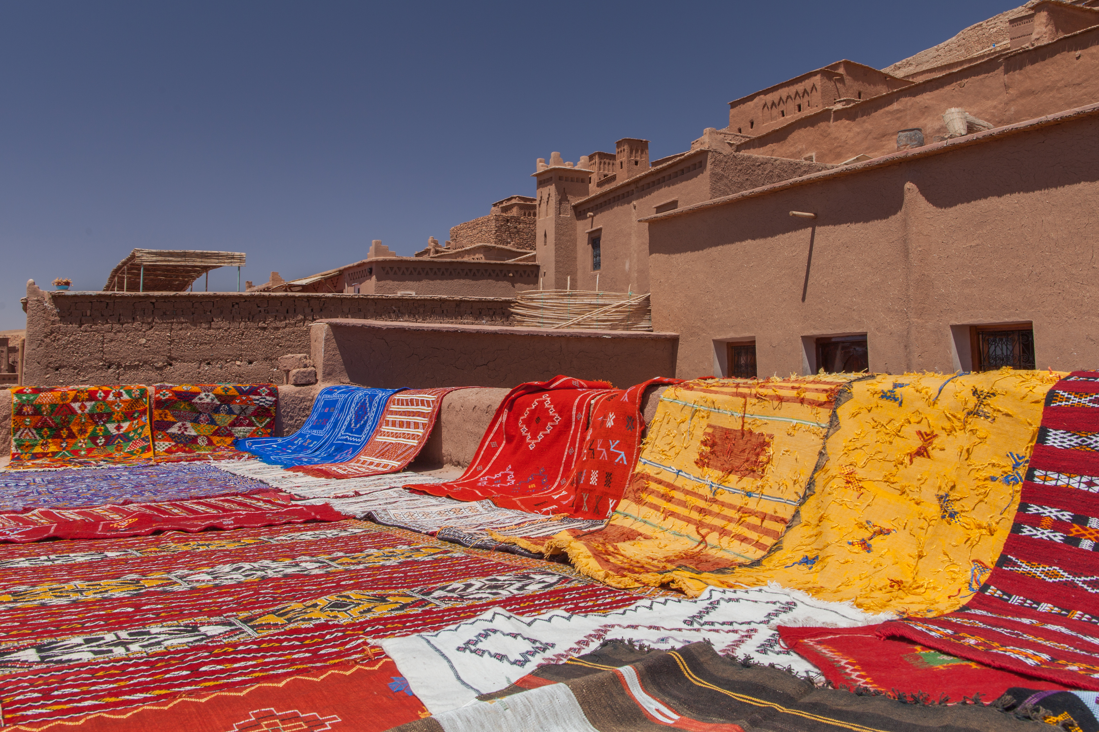 Aït-ben-Haddou est situé dans la vallée de l’Ounila, au sud de Télouet, fief du Glaoui, vallée qui était un point de passage traditionnel des caravanes reliant Marrakech au sud du Sahara. Aït Benhaddou is situated in the valley of Ounila south of Télouet, a stronghold of the Glaoui valley which was a traditional crossing point linking Marrakech caravans south of the Sahara.